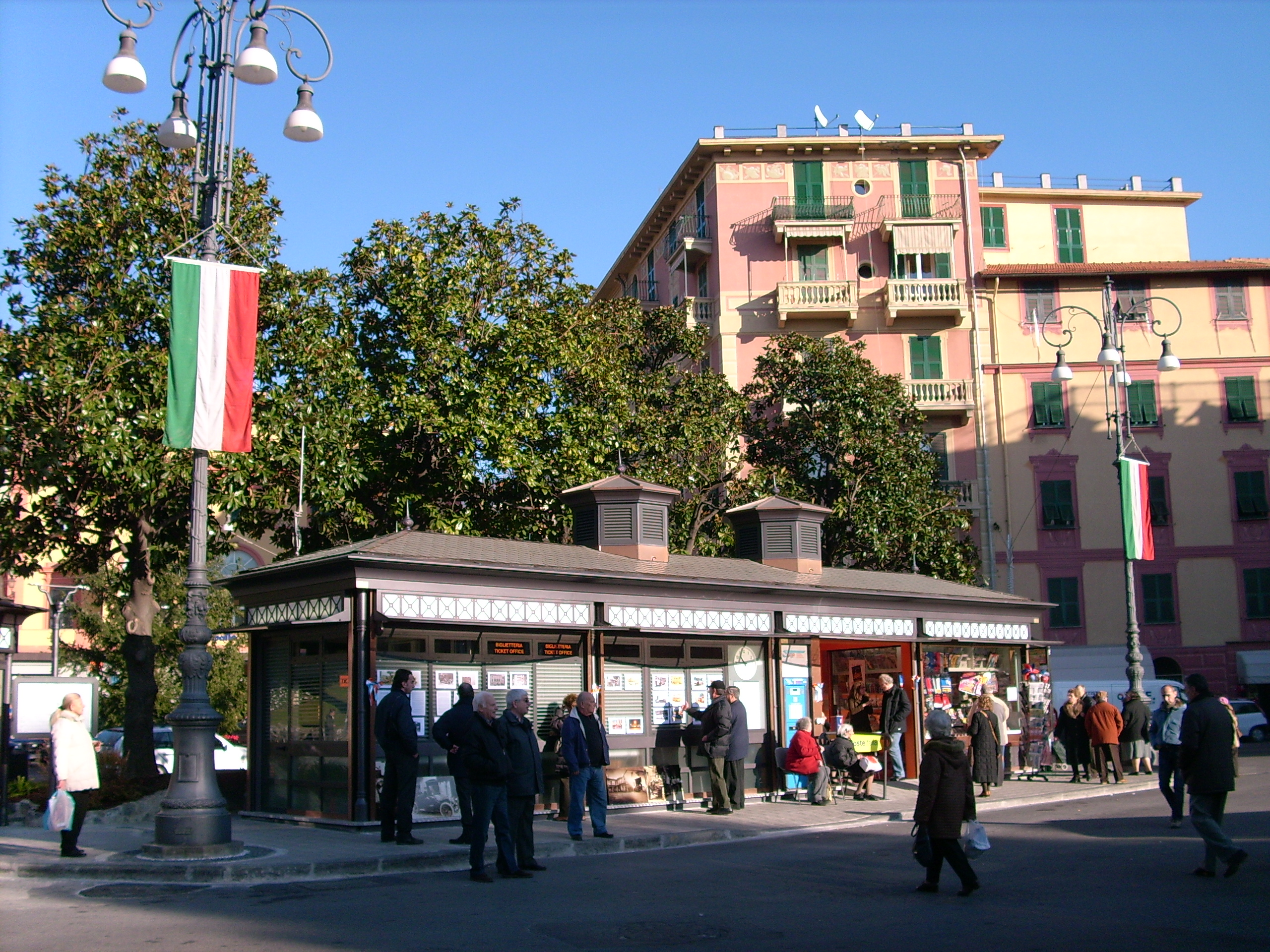 Terminal bus di Rapallo, Liguria, Italia